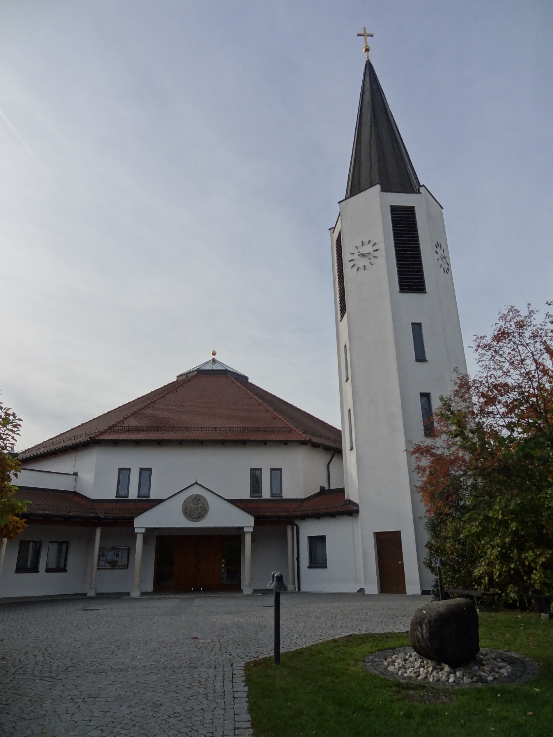 Außenansicht der Pfarrkirche St. Johannes in Piflas (Markt Ergolding, Landkreis Landshut, Bayern)